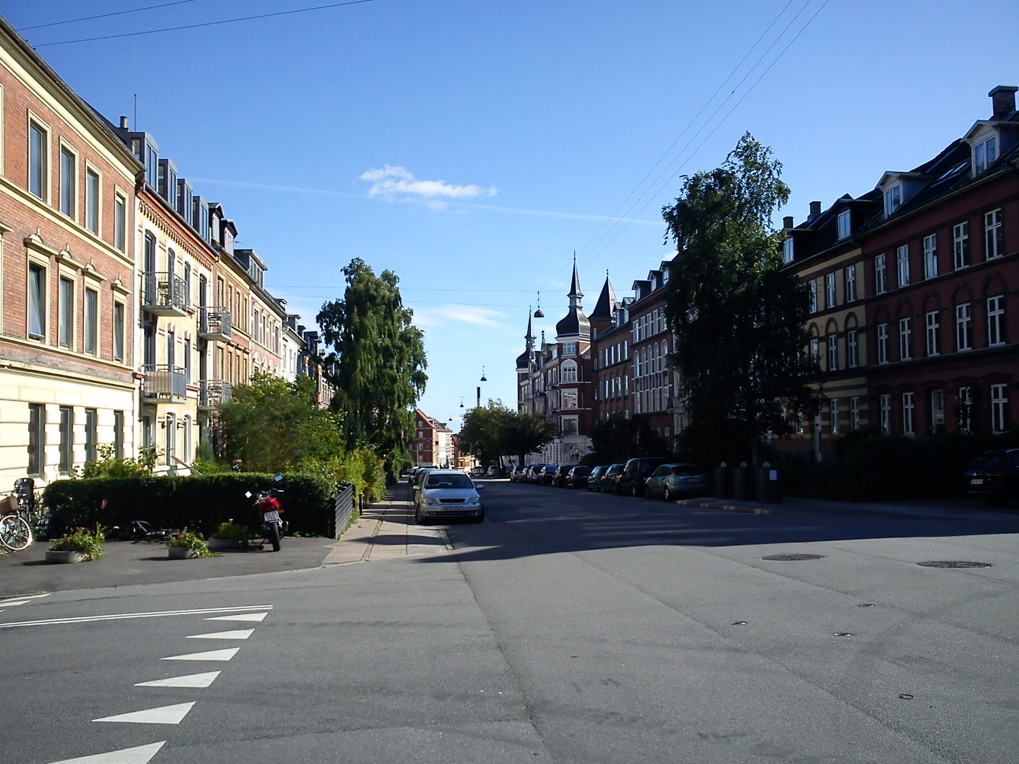 Øverste del af Munkegade i Aarhus, med udsigt over midtbyen. Kendt som Ny Munkgade.